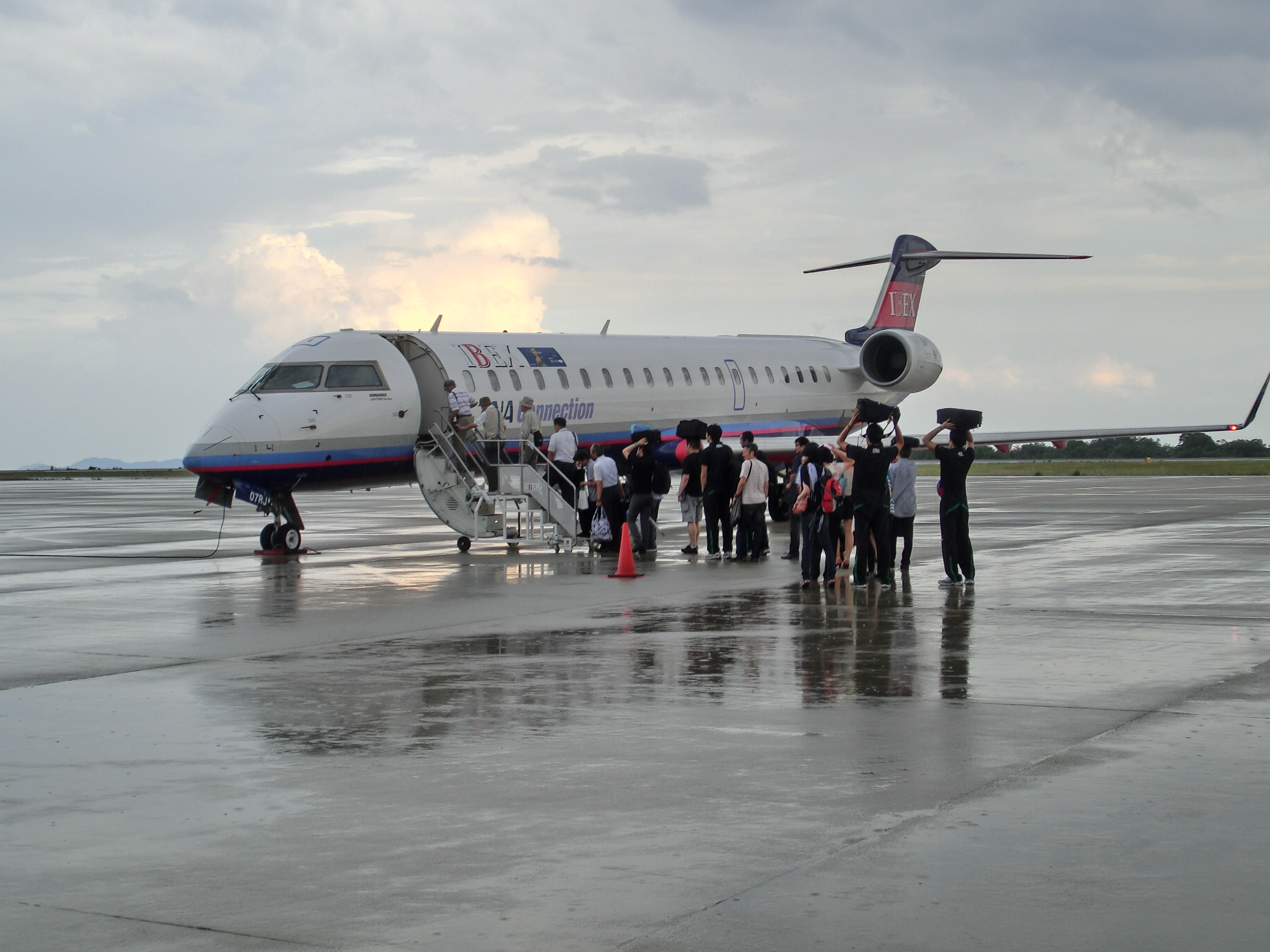 IBEX AirlinesのCRJ700。広島空港にて撮影。